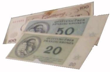 Geldscheine aus dem KZ Theresienstadt, die die Bonner Jüdin Else Waldmann während ihrer Gefangenschaft erhielt Fundort: „Gedenkstätte für die Opfer des Bonner Nationalsozialismus“ (Bonn) Aufnahme: 17.4.2006 Url